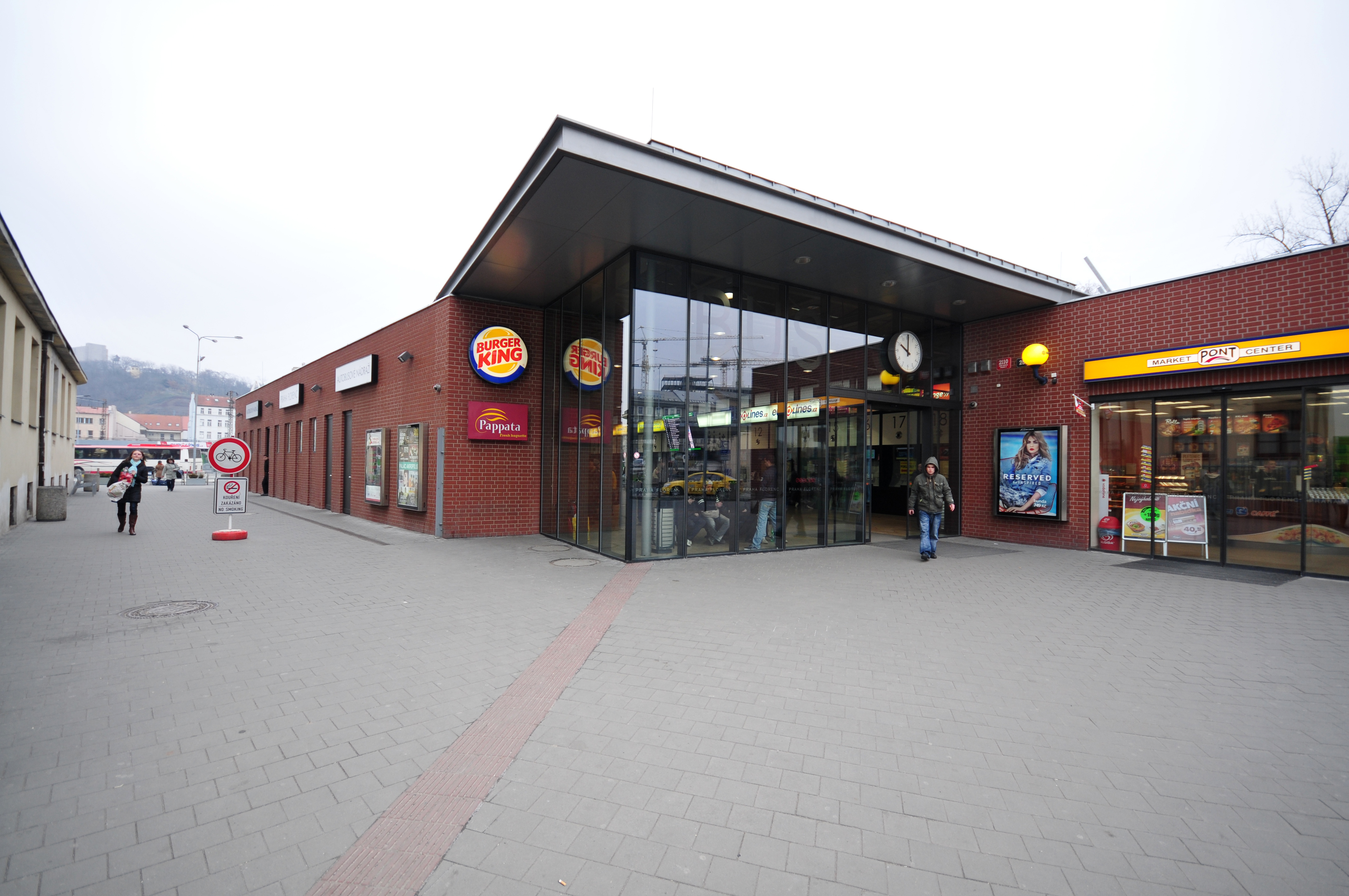 Autobusové nádraží Praha Florenc